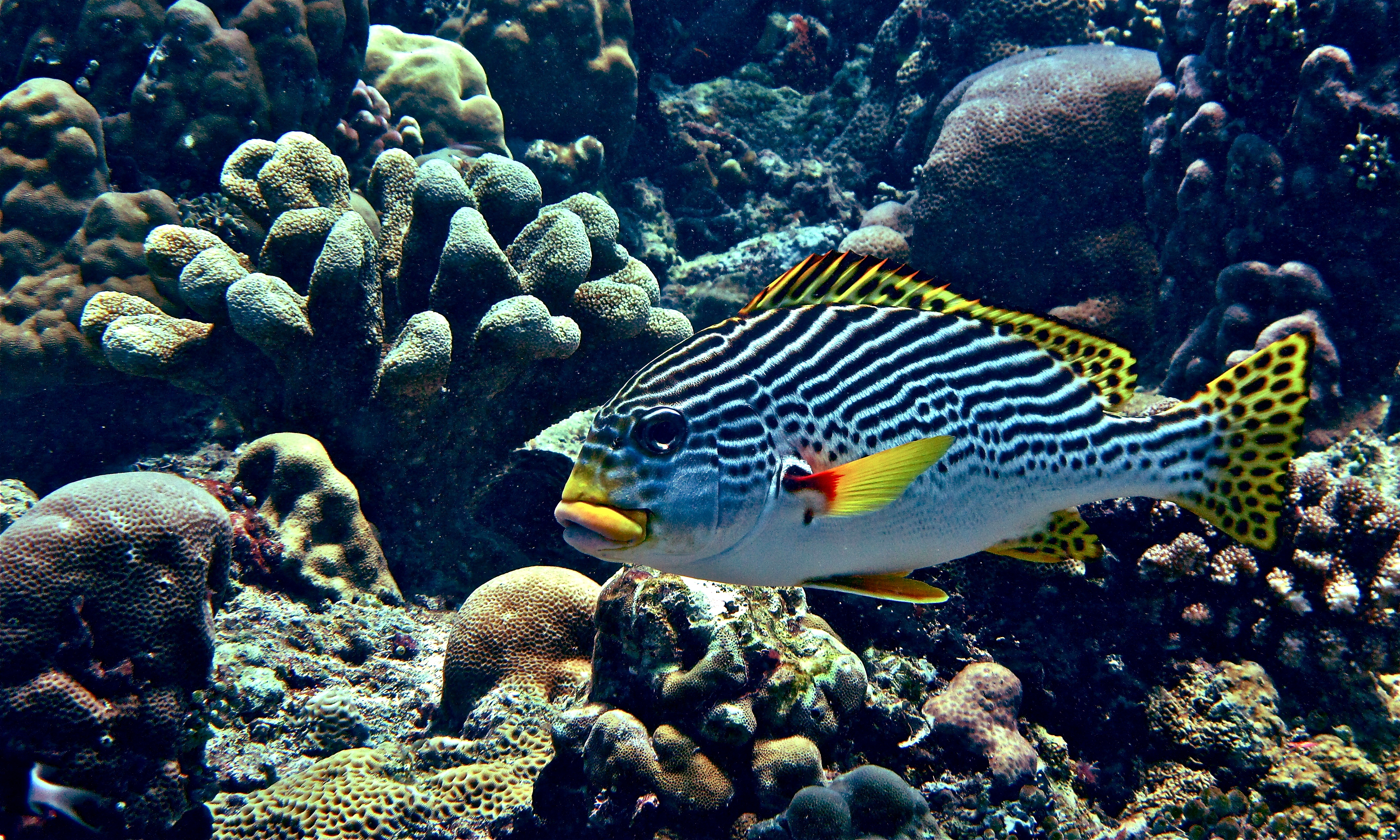 Likuan II, Bunaken Island, Sulawesi, INDONESIA